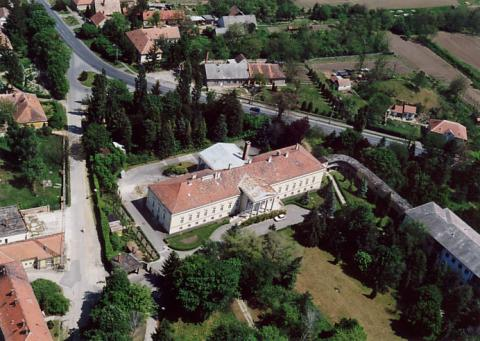 Hegyfalu, Hungary, aerialphotography